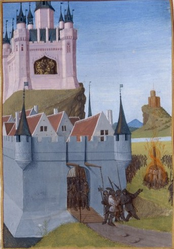 Philippe V le Long et Louis Ier de Nevers